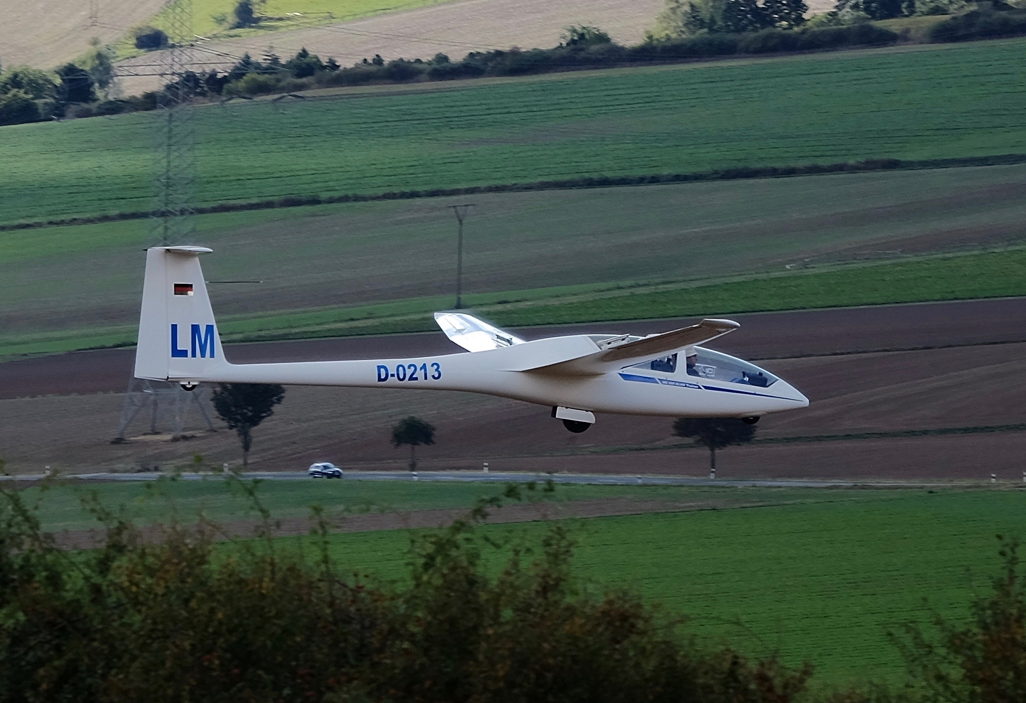 DG 500 im Anflug auf den Flugplatz Hellenhagen